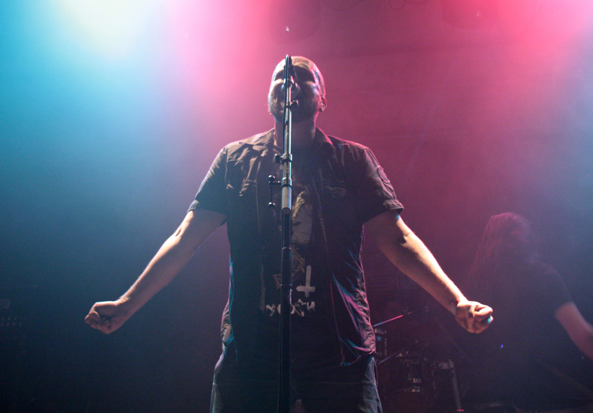 Zanger Dimitri Verhoeven tijdens een live optreden met Megasonic in 2015